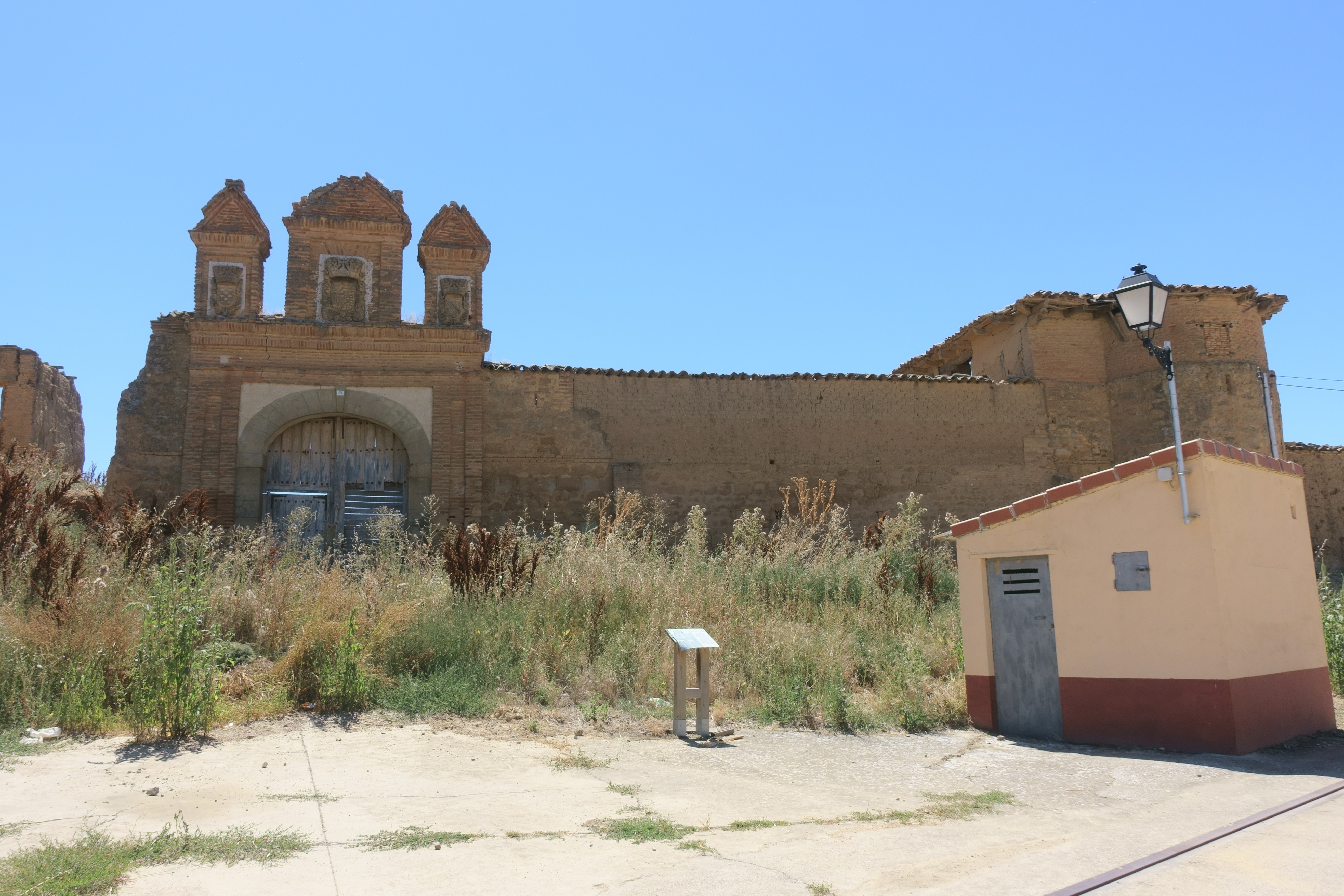 Ruinas del palacio de los Villagómez, en Villagómez la Nueva (Valladolid, España).